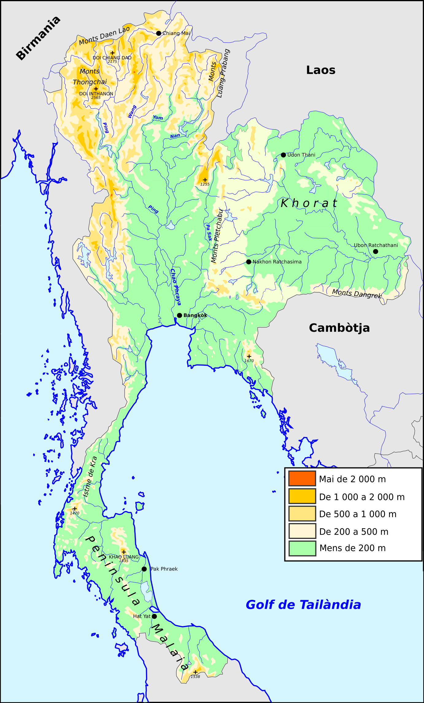 Topografia de Tailàndia.